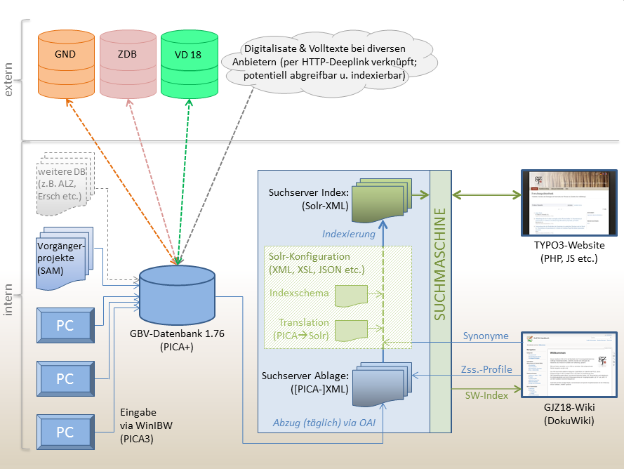 IT-Infrastruktur des Projekts "GJZ 18"